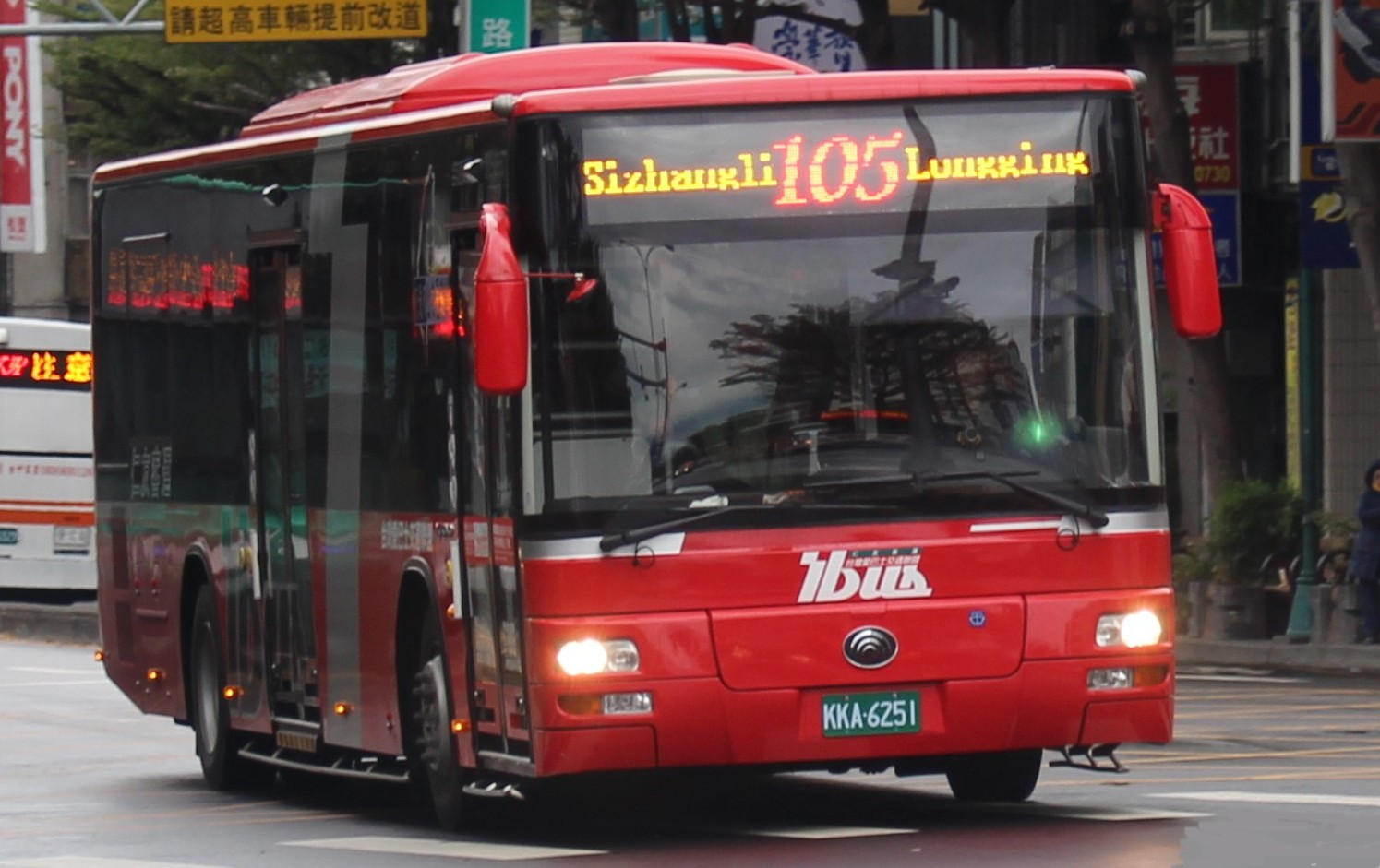 仁友客運KKA-6251 105